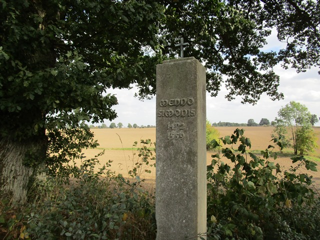 Gedenkstein für Menno Simons an der Stelle des früheren von Täufern bewohnten Dorfes Wüstenfelde in Holstein